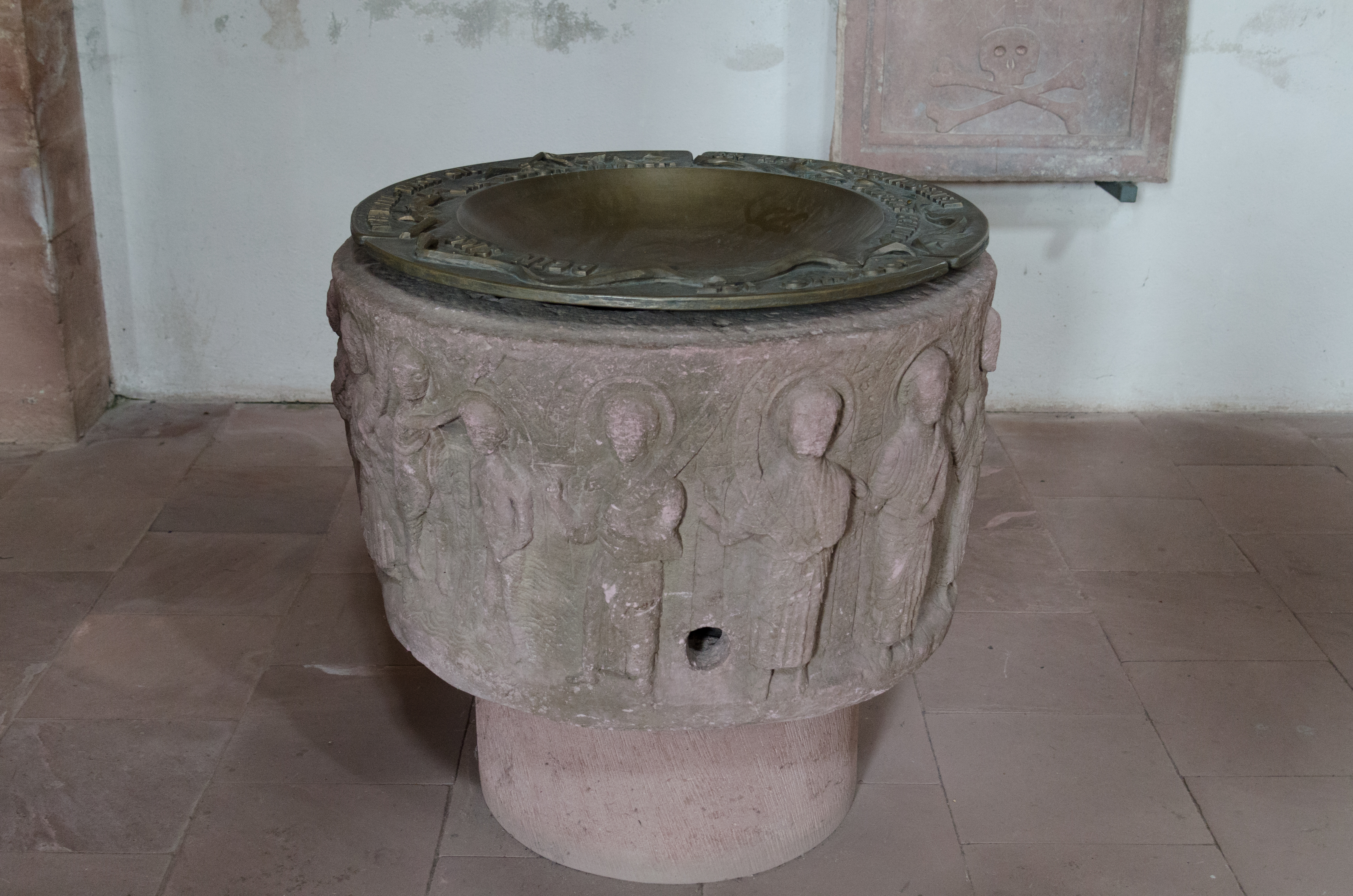 Neustadt am Main, Katholische Pfarrkirche St. Michael und St. Gertrudis, Interiror